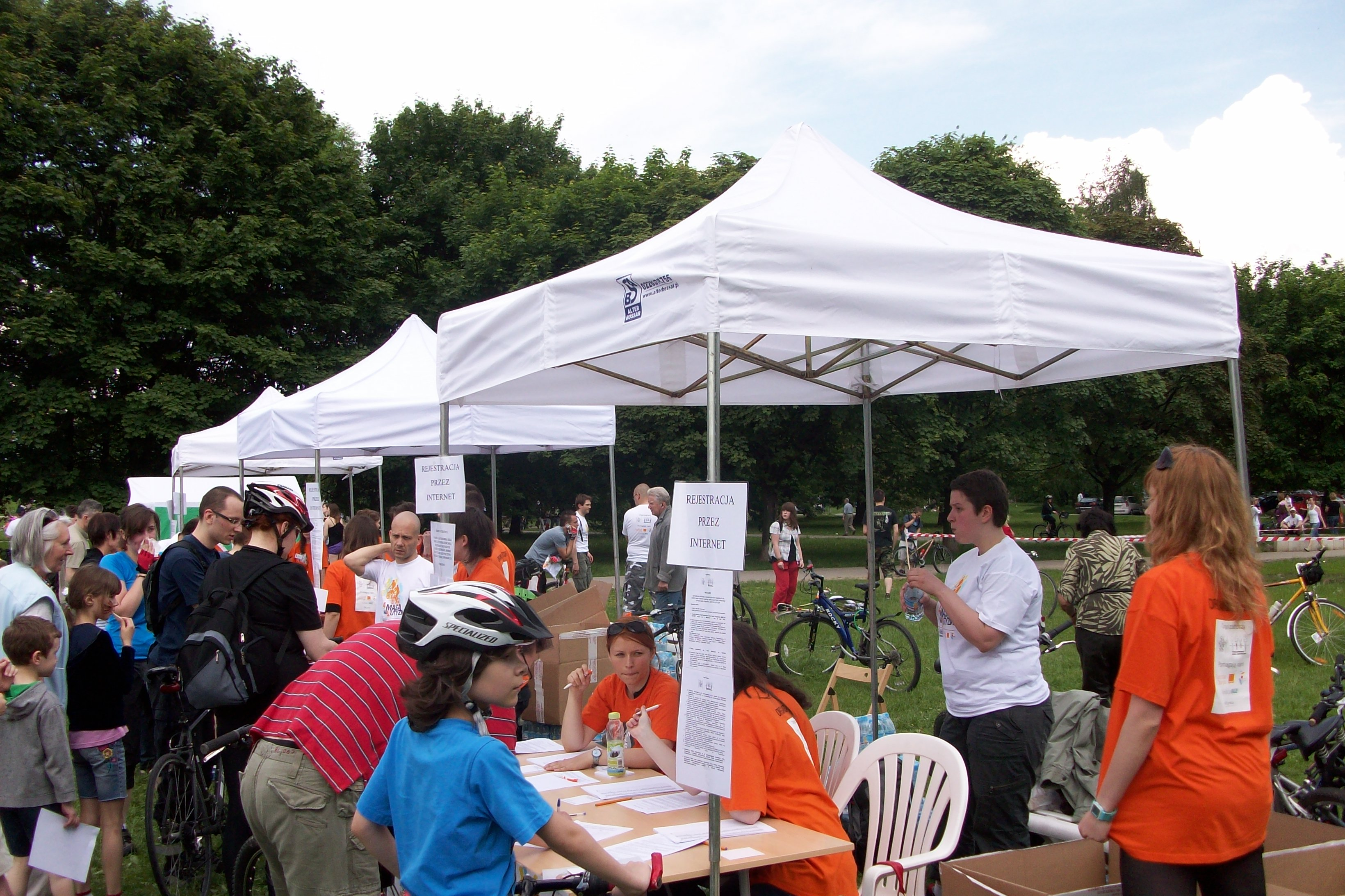 Masa na Autyzm - rejestracja na Polu Mokotowskim w Warszawie 22 maja 2010 roku.